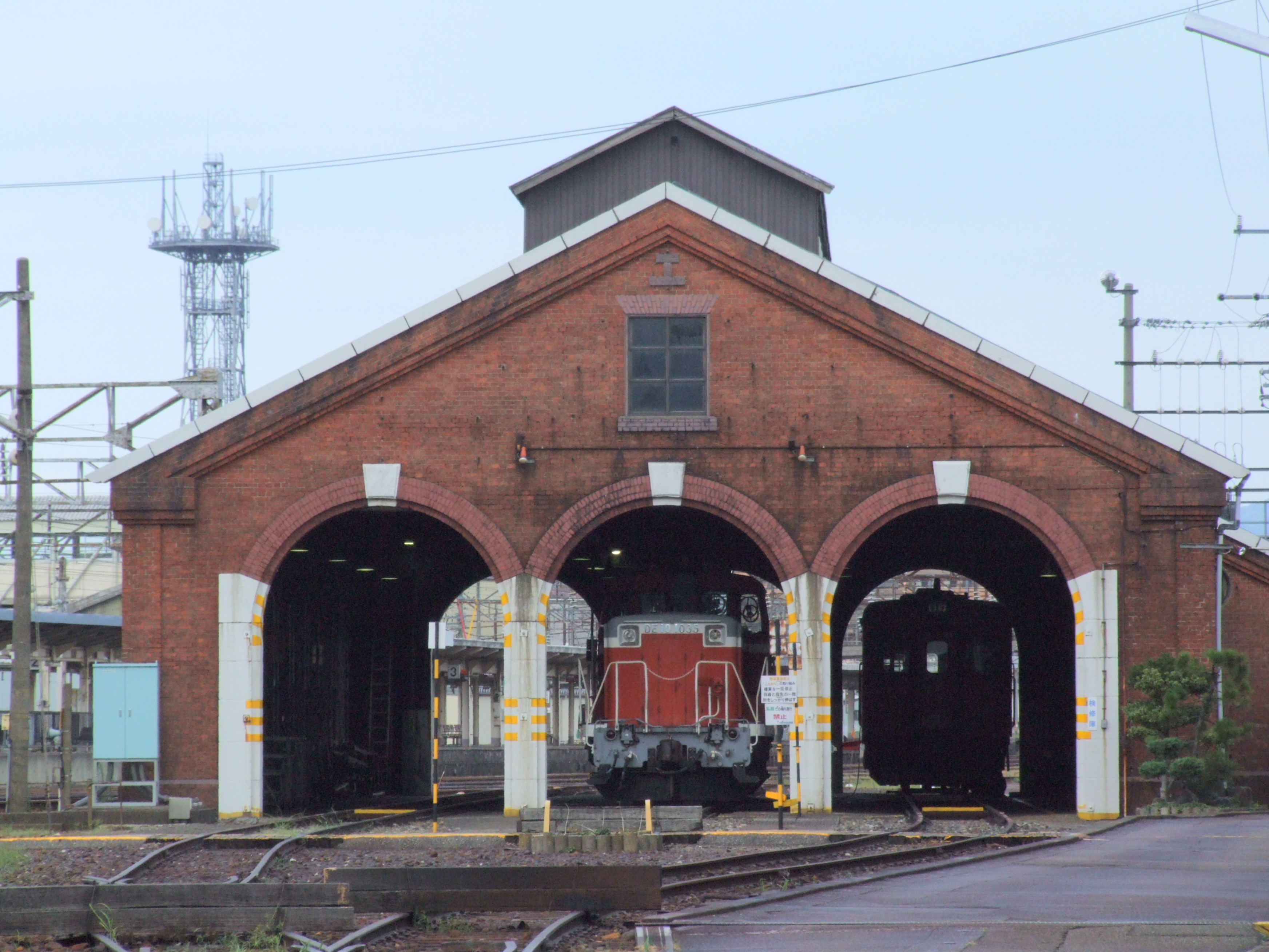 糸魚川駅のレンガ車庫(敷地外から撮影）2008年8月15日撮影